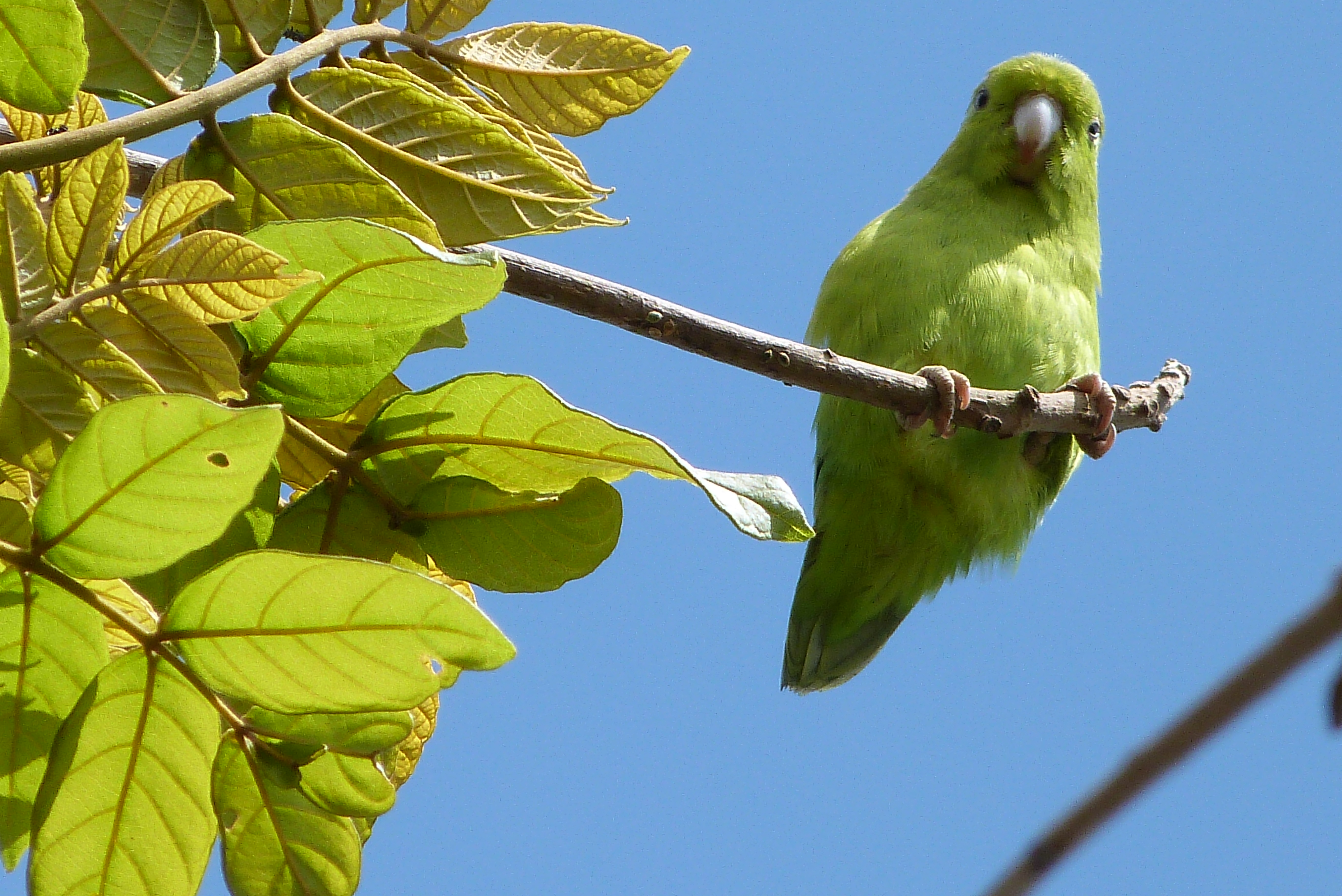 Foto tirada em Entre Rios - MG